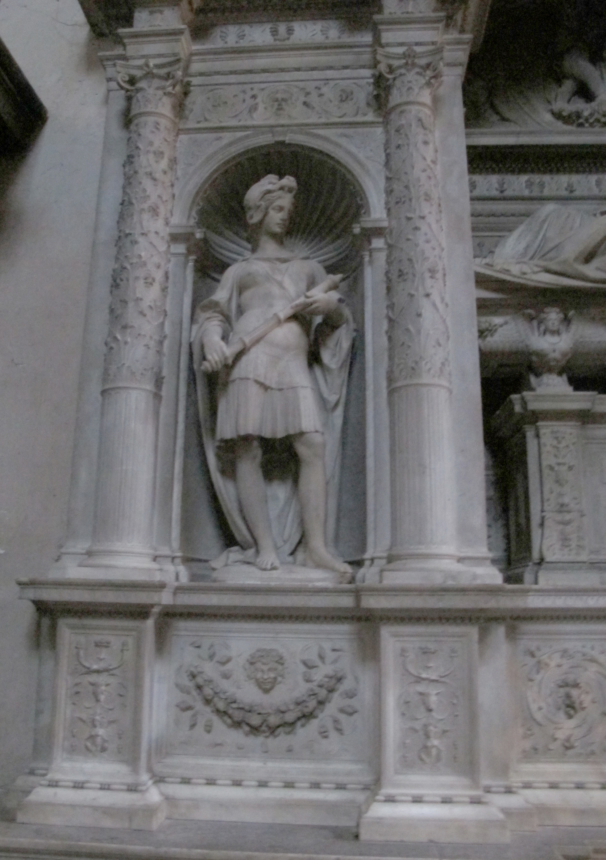 Sansovino, monumento funebre di girolamo basso della rovere